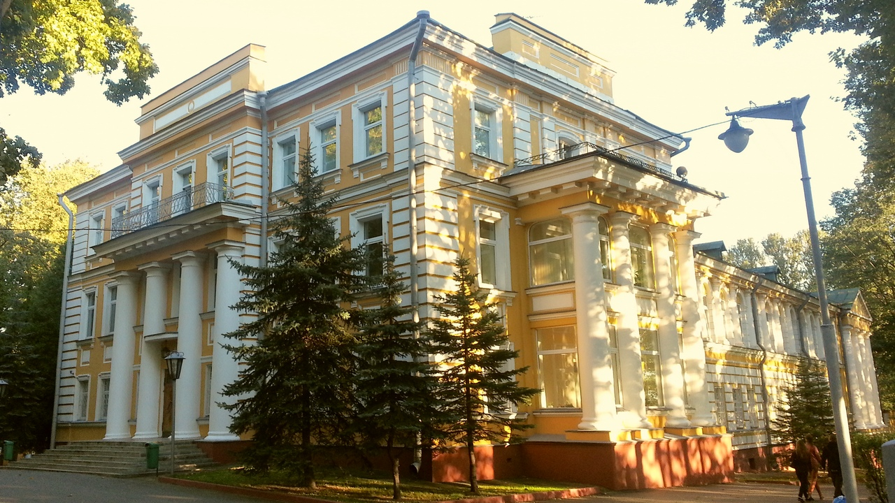 Беларуская (тарашкевіца): Будынак былога палаца губэрнатара. г. Віцебск This is a photo of Belarusian heritage monument. Reference number: 212Г000075 ( WLM)